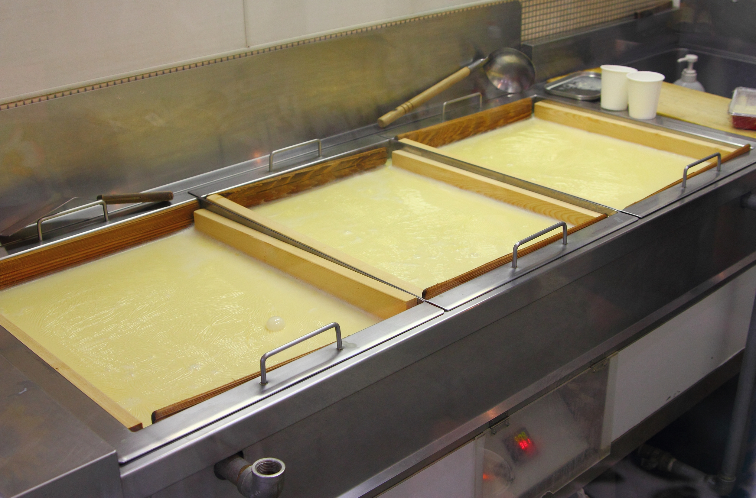 ゆばの生産中